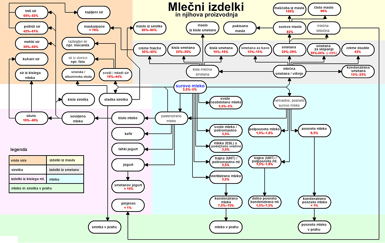 Mlečni izdelki in njihova proizvodnja / predelava mleka)